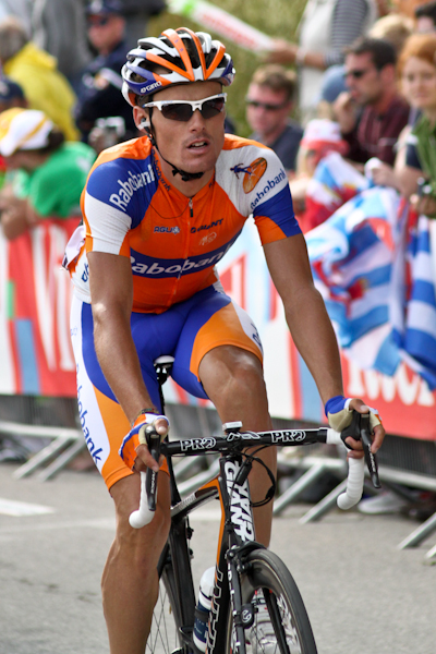 Luis Leon Sanchez